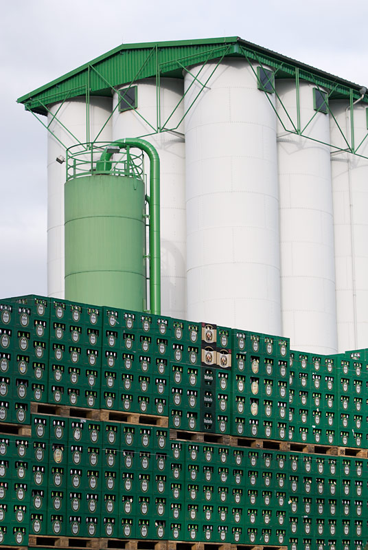 Silo und Bierkästen der Licher Privatbrauerei, Lich, Mittelhessen